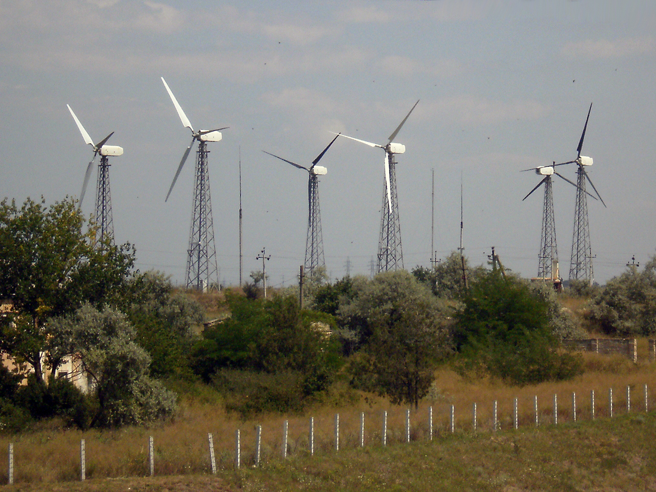 Одесской области